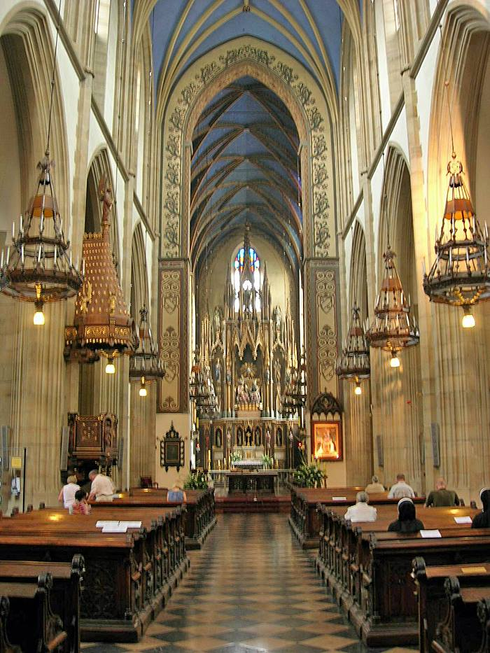 Innenansicht zum Hochaltar